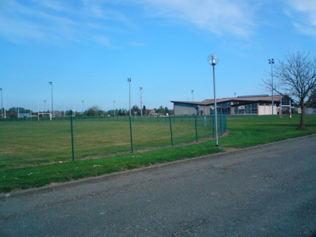 Complexe Sportif Pierre Germes: ville du Passage d'Agen